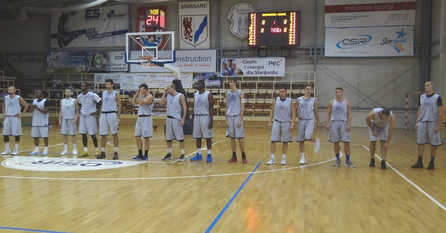 Prezentacja Spójni (01.09.2018)